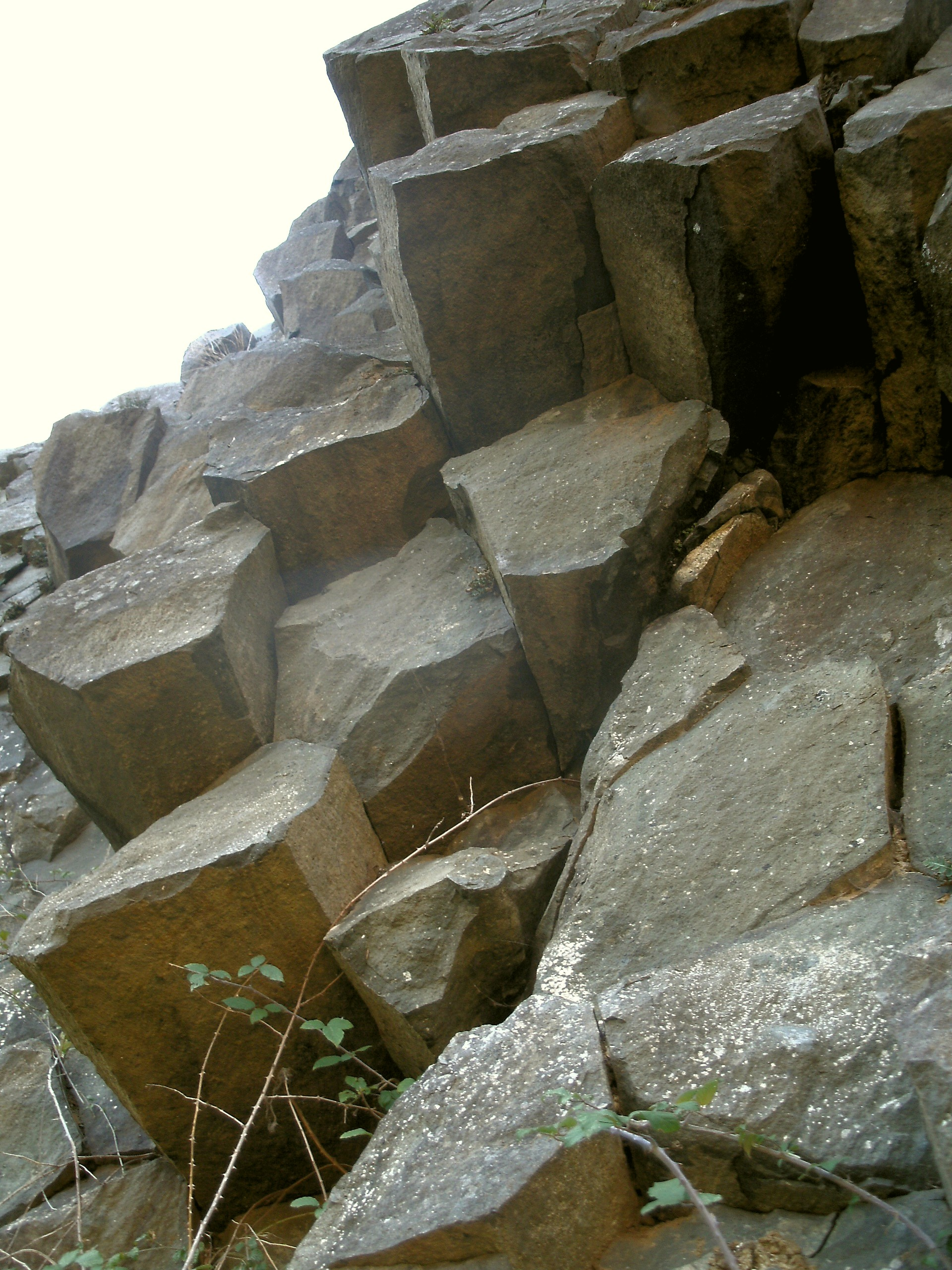 Zutabe basaltikoak, Fruizen (Bizkaia)